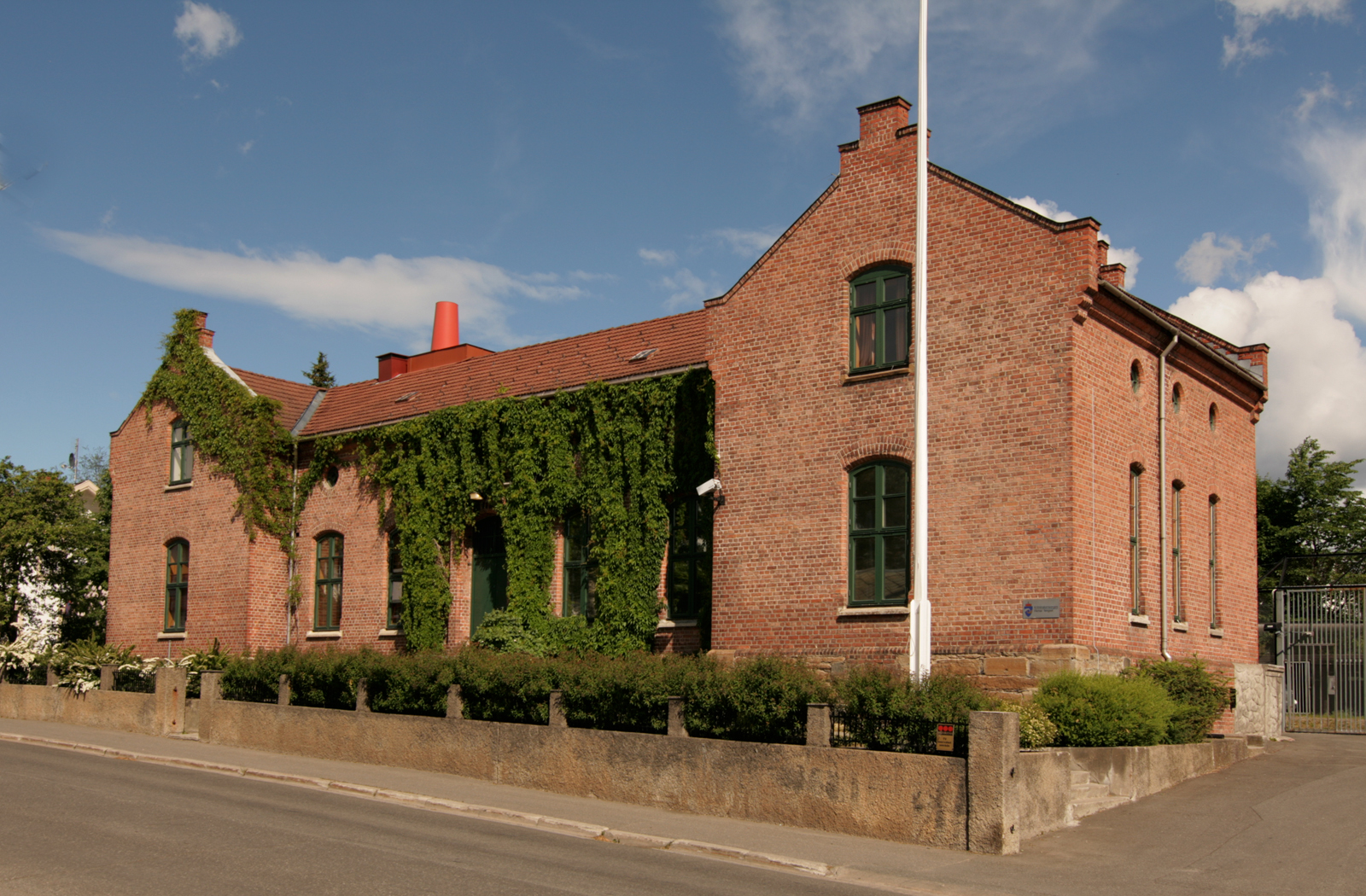 Hamar kretsfengsel. Bygd 1864. Arkitekter: Heinrich Schirmer og Wilhelm von Hanno.